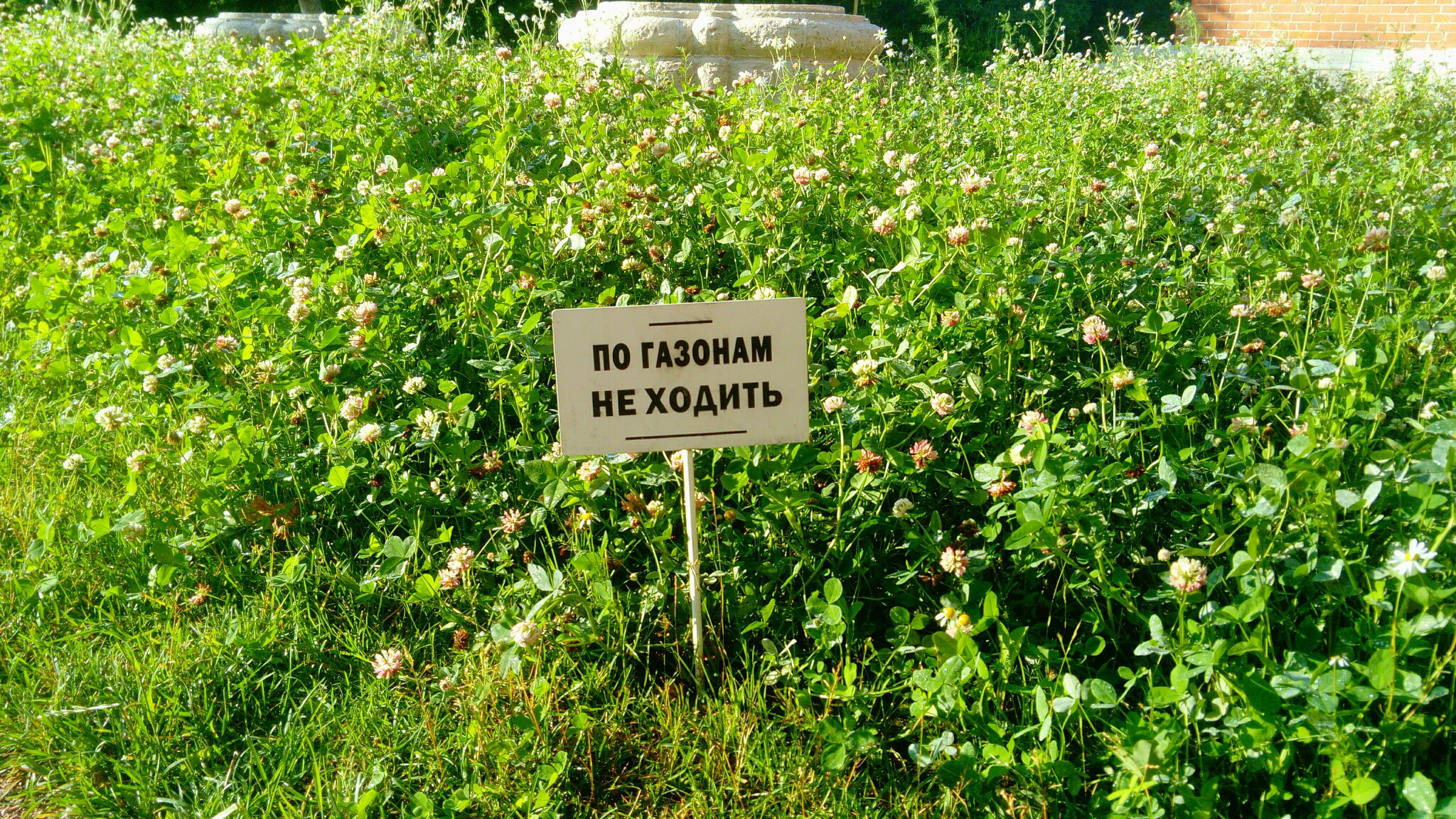 Запрещающая ходить по газону табличка в Петербурге (Пушкин, Александровский парк, Шапель)